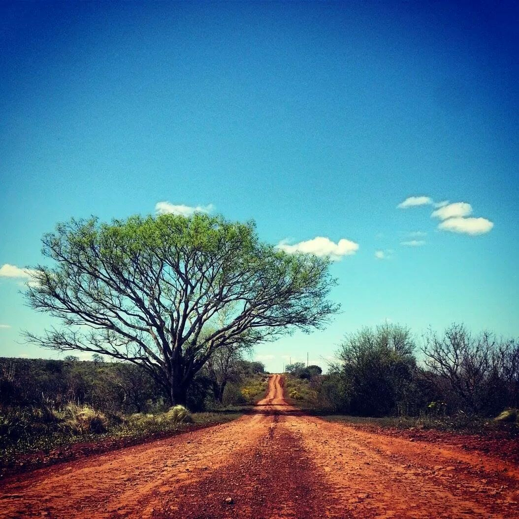 Camino característico de la provincia de Misiones, con sus tierras rojizas y verde vegetación.